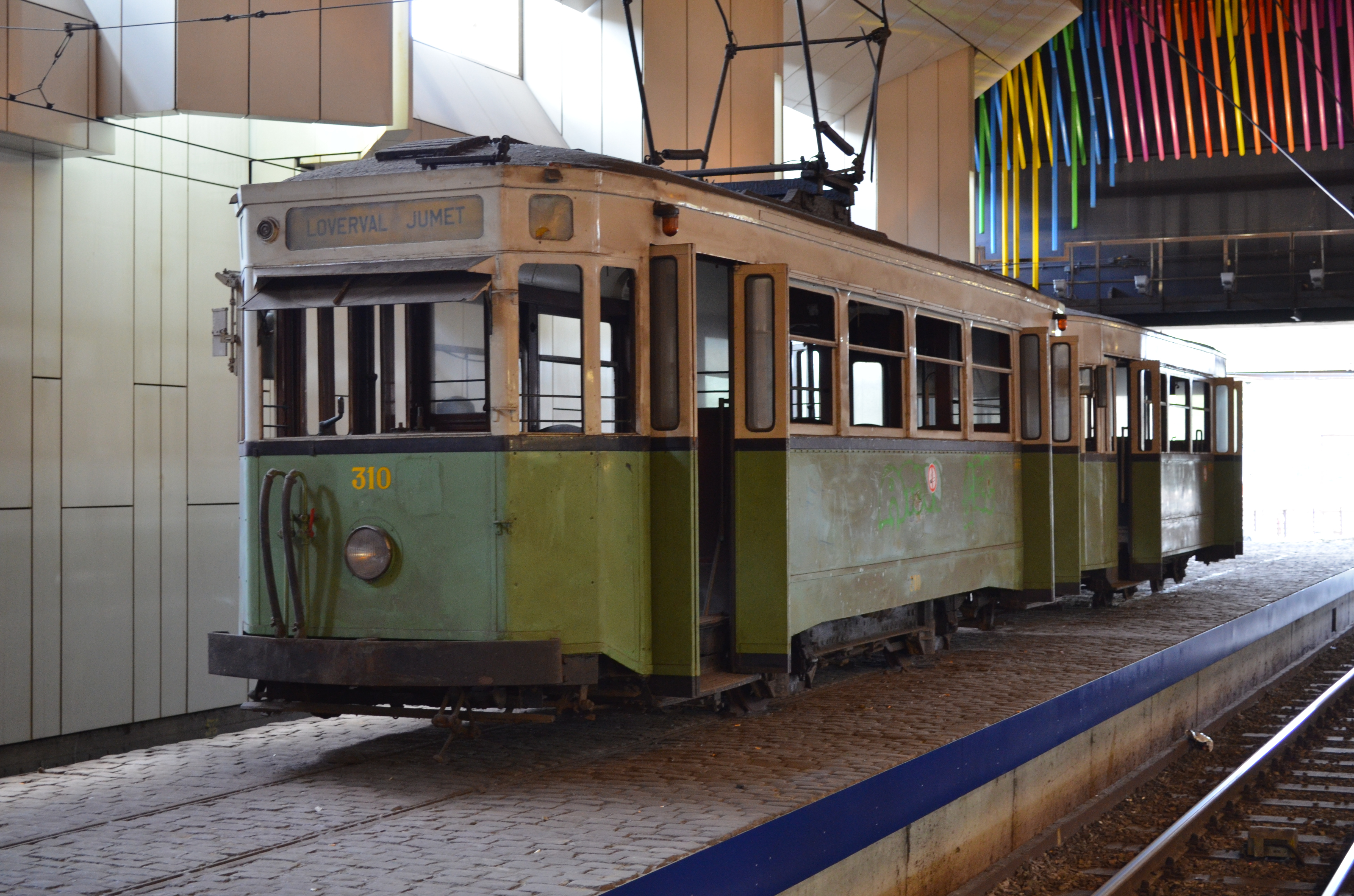 Charleroi - Station Beaux-arts du métro léger de Charleroi. Motrice 310 et remorque 12 de l'ancienne Société des tramways électriques du Pays de Charleroi et extensions (TEPCE)